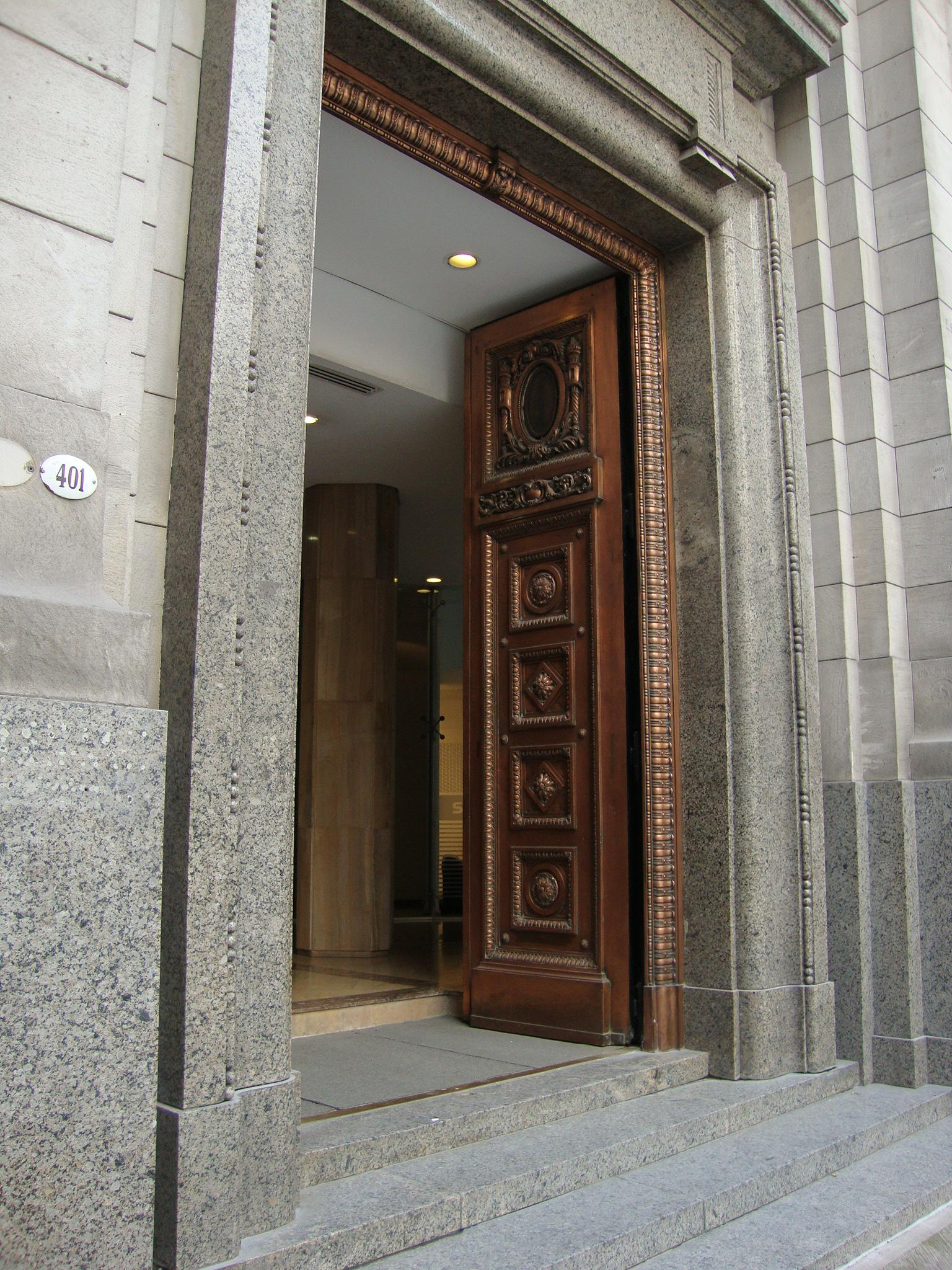 La puerta de acceso de bronce a la planta baja del edificio del Banco Alemán Transatlántico en Buenos Aires. Esquina de las calles Bartolomé Mitre y Reconquista (ochava esquina noroeste).